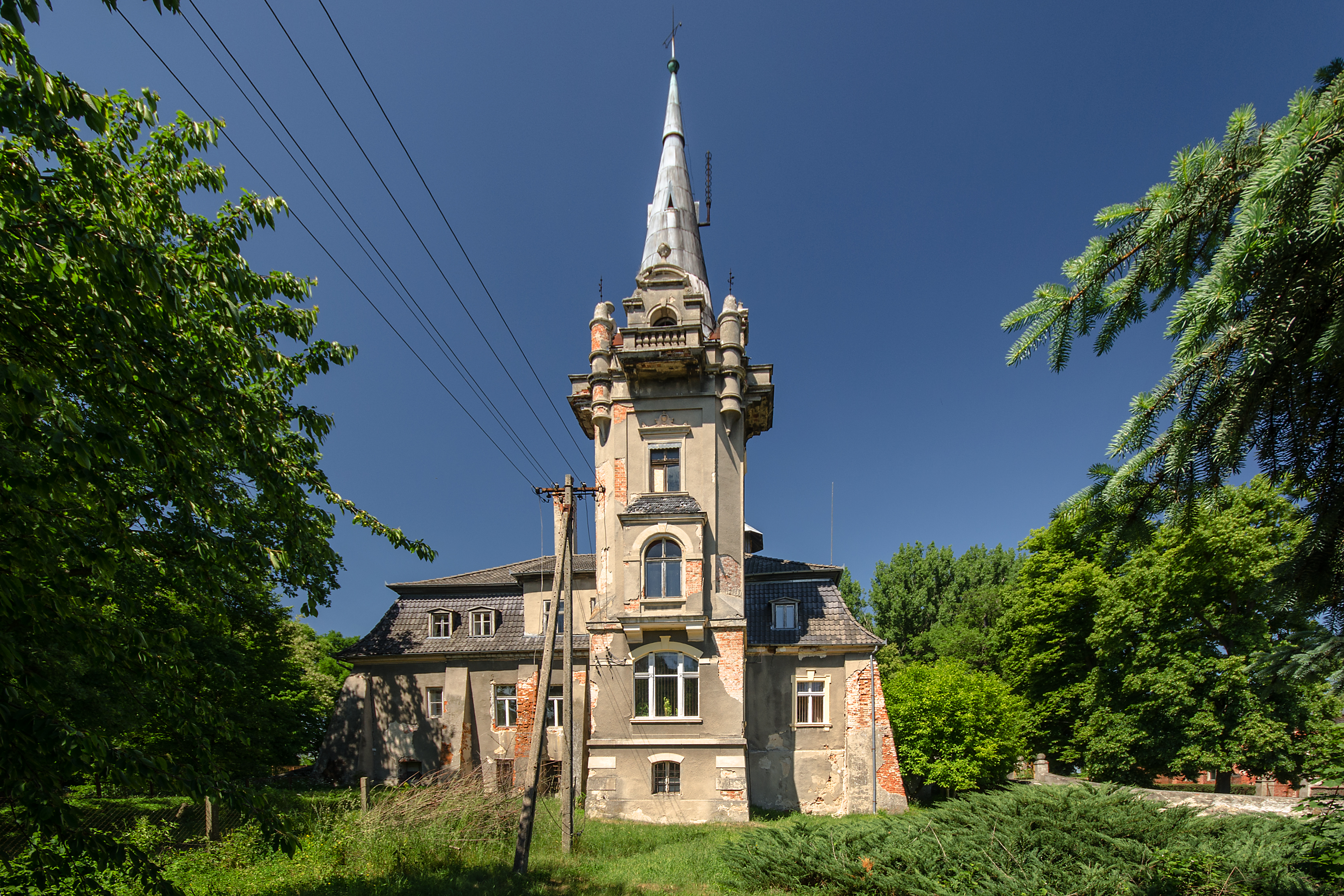 Naratów Nr 65, pałac, 1735, 1900